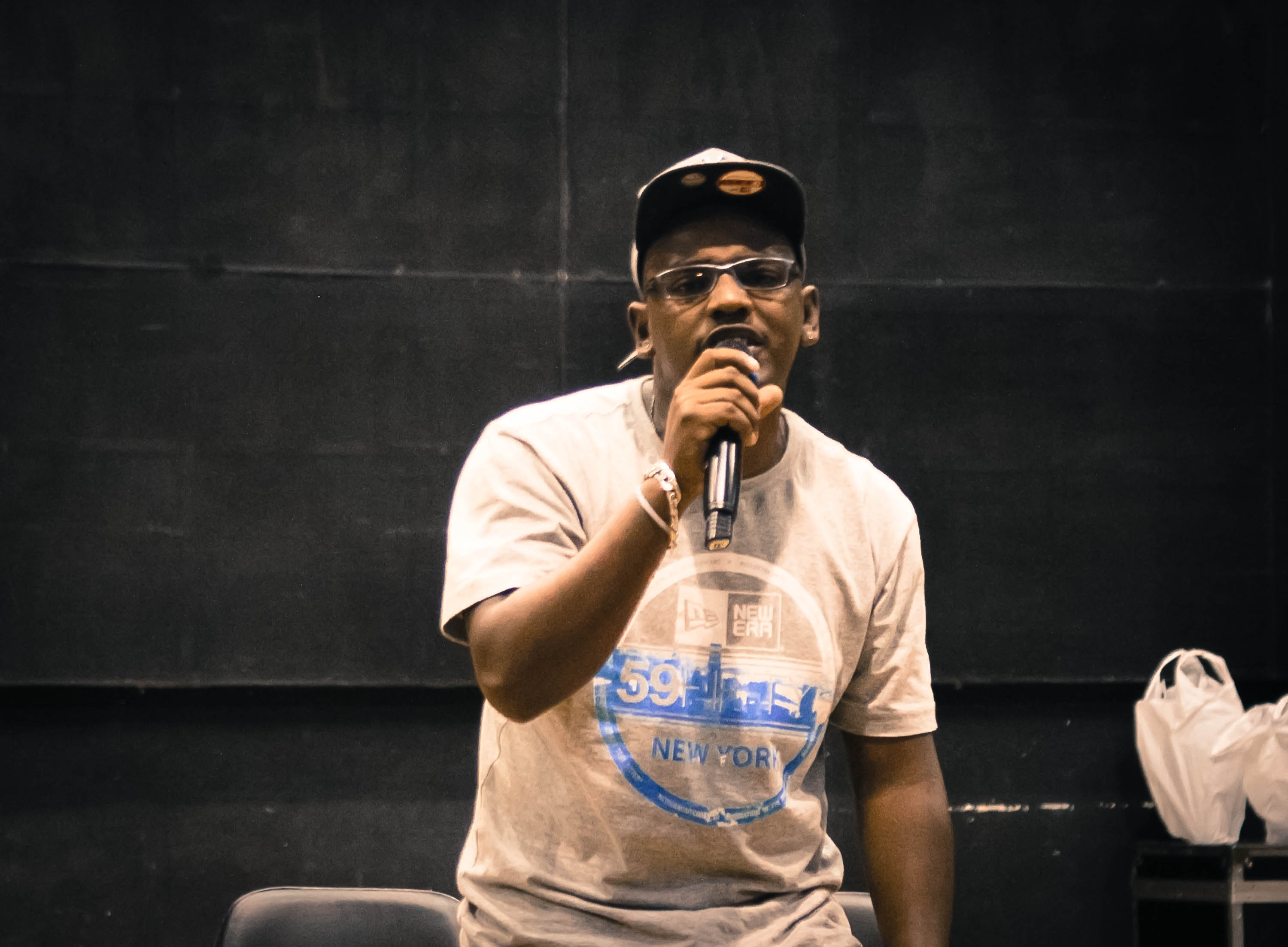 Reunião da liga do funk @ Galeria Olido - SP (CC by SA) Fora Do Eixo